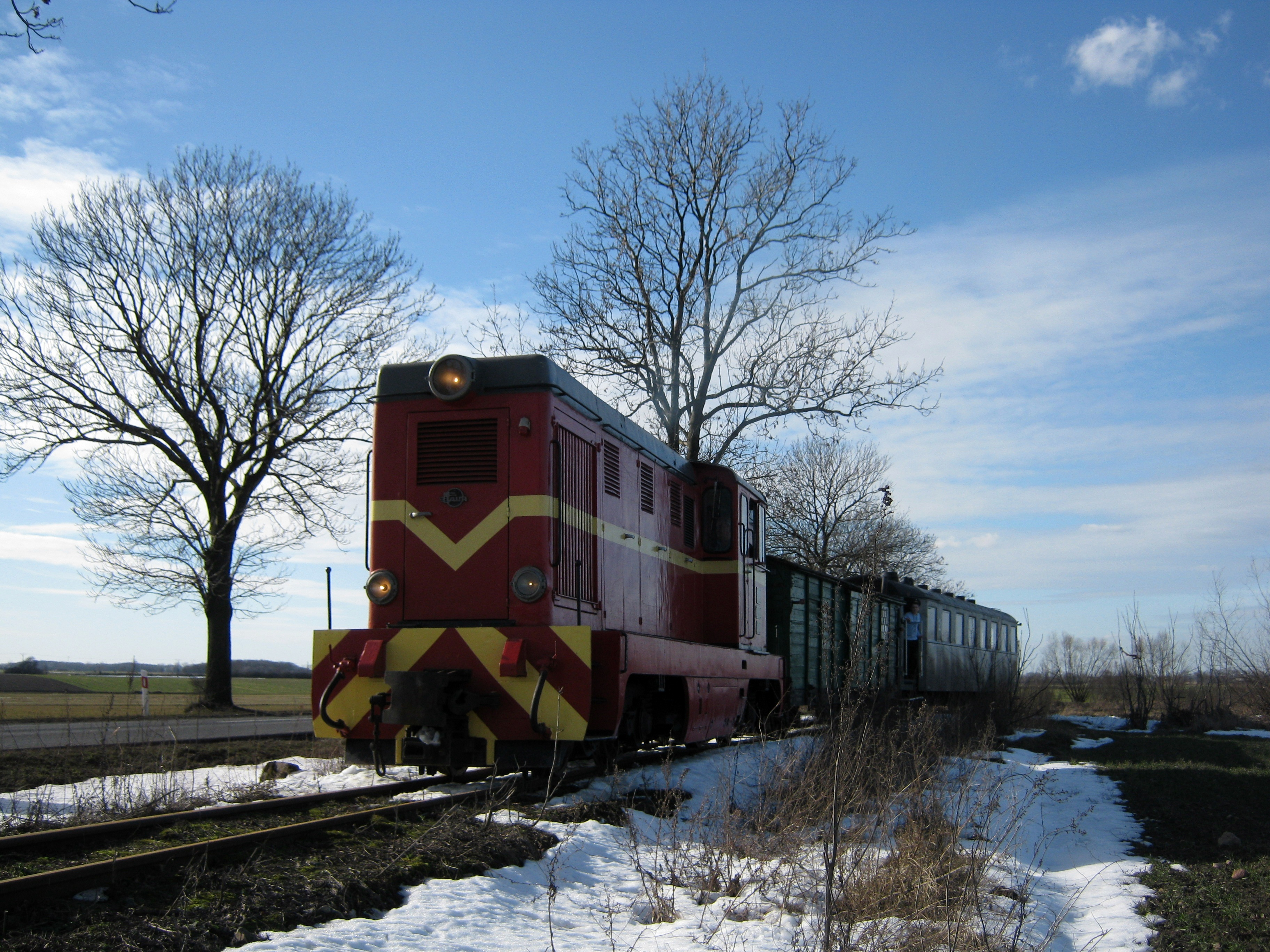 Lxd2-369 Gnieźnieńskiej Kolei Wąskotorowej podczas fotostopu w Małachowie